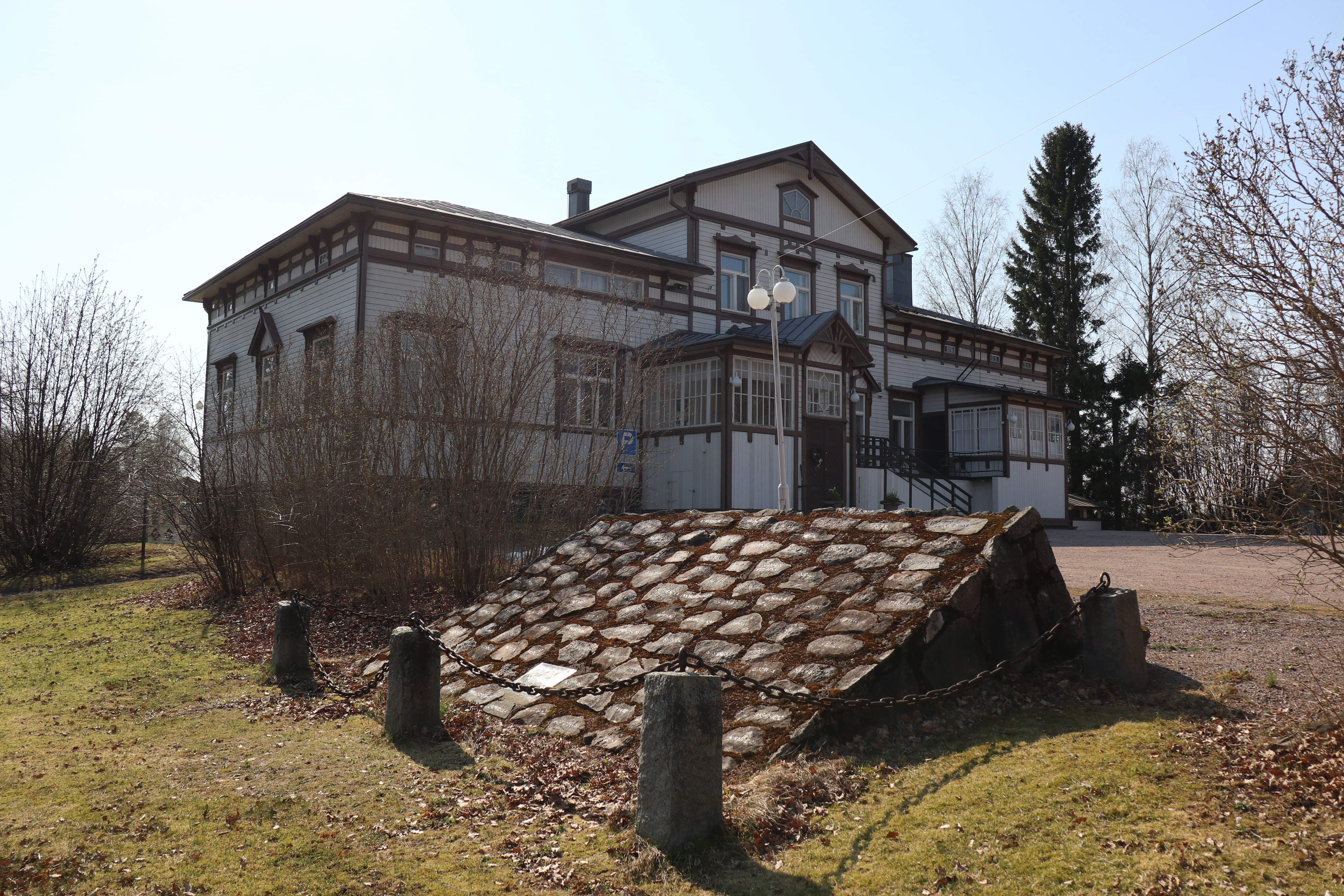 Sälinkään kartano Mäntsälän Sälinkään kylällä. Etualalla Kalle Honkasen kokoama Torppari-muistomerkki vuodelta 1983.